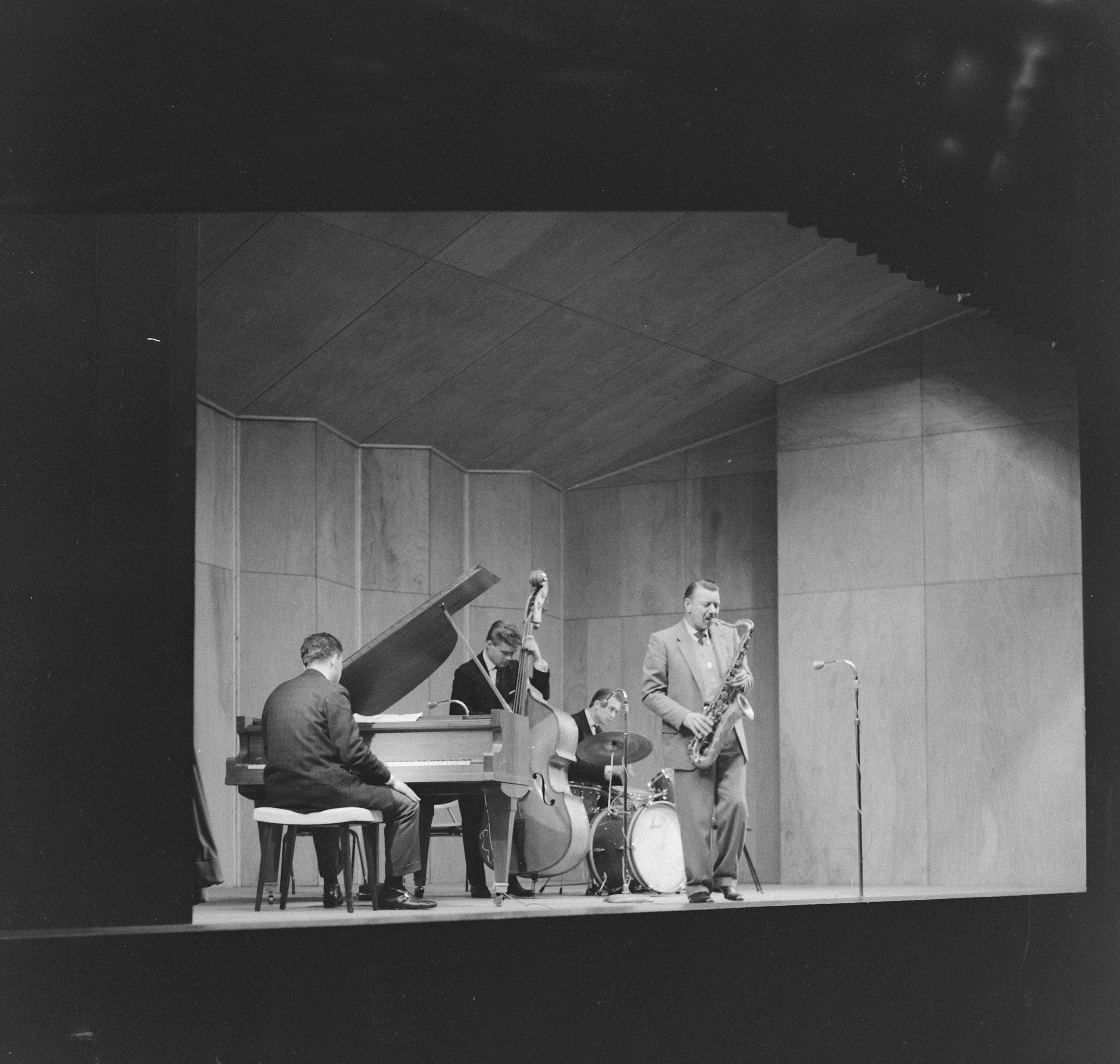 Jazz-concert AMVJ gebouw te Rotterdam (Nederland), 10 januari 1960. Jazz-saxofonist Jack Sels (rechts) en pianist Frans Elsen (links)